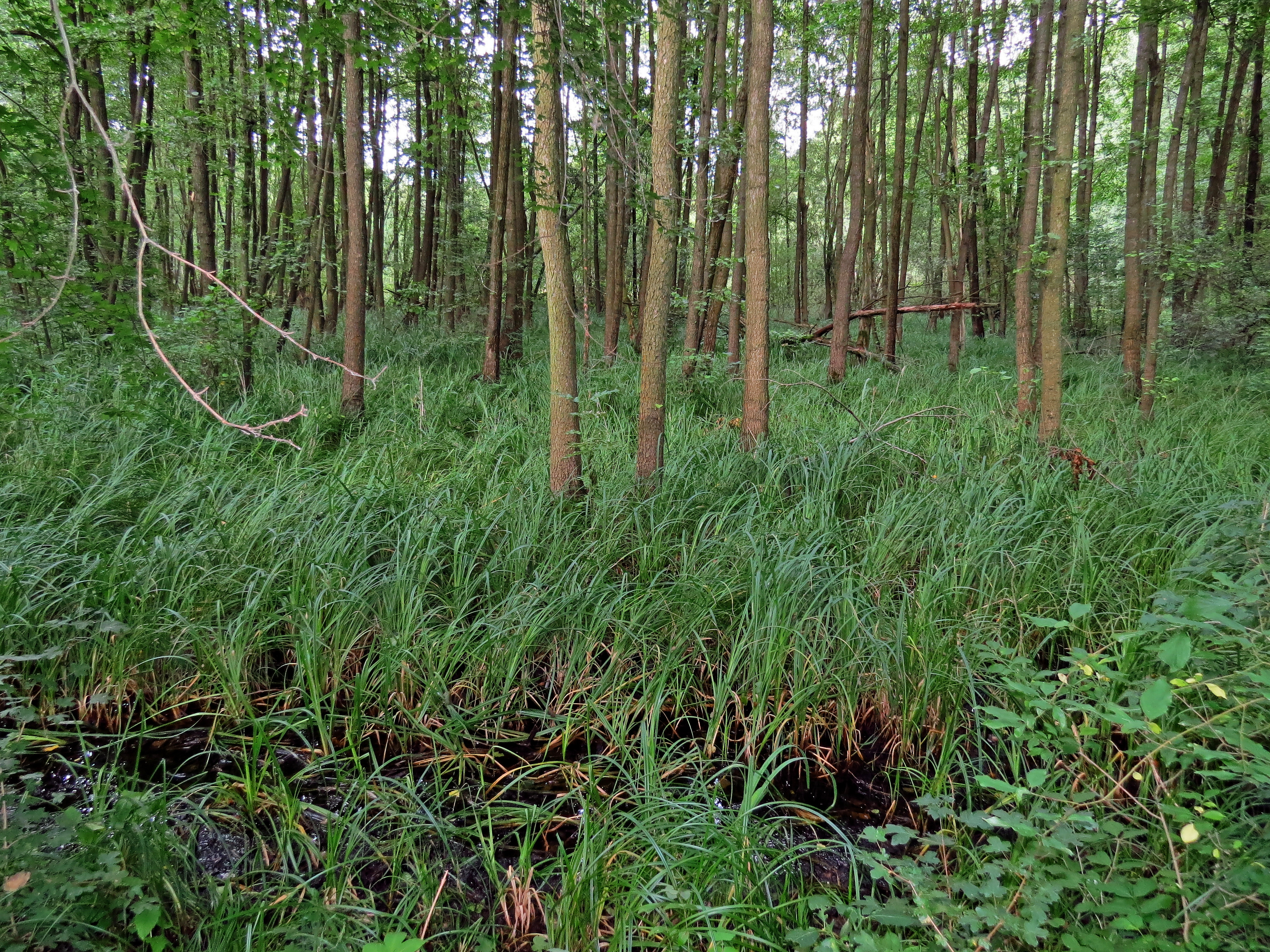 Project: Chráněná území.